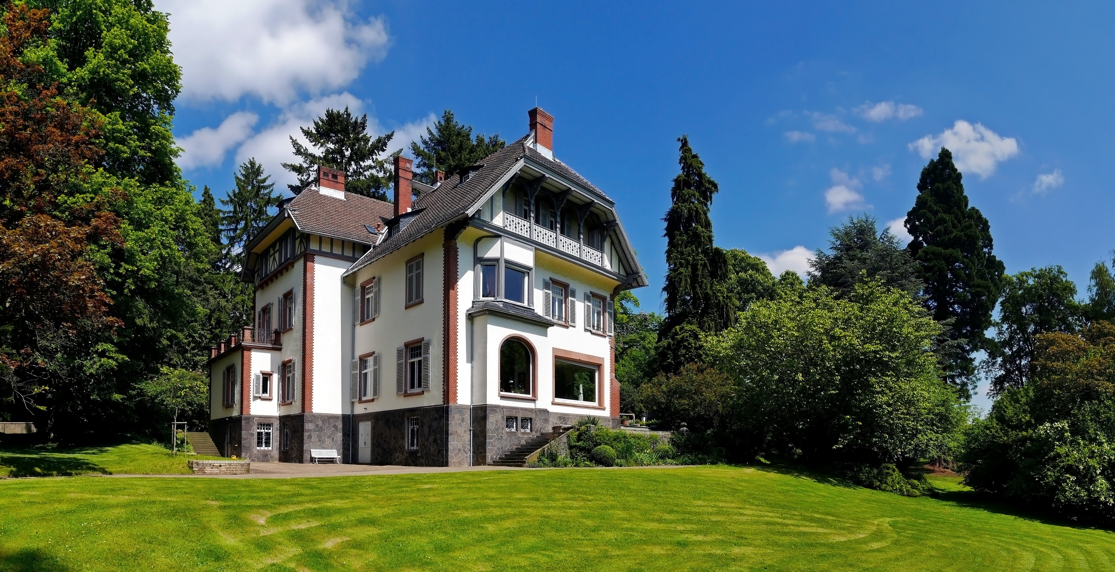 Die Villa Gail liegt im Gail’schen Park im Biebertaler Ortsteil Rodheim in Hessen. Erbaut wurde die Villa in den Jahren 1896 und 1897 im Auftrag von dem Gießener Tabak-, Zigarren- und Keramikfabrikanten Gail als sommerlichen Landsitz. Rechts ein 1896 gepflanzter Riesenmammutbaum mit 32 m Höhe. Diese Datei wurde mit Hugin erstellt.